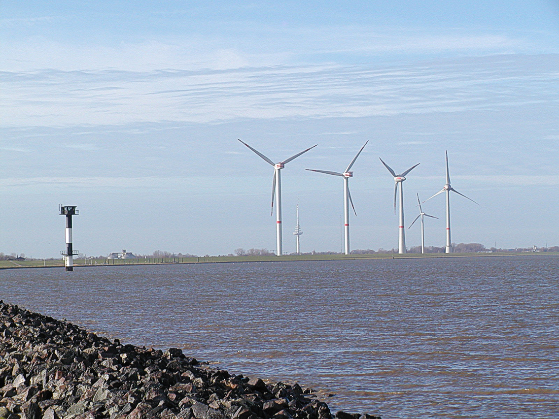 "... Offshore-Windenergie Testfeld in Cuxhaven - Die leistungsstärkste Windenergieanlage der Welt (E112 von der Enercon GmbH) leistet 6 Megawatt. Ganz rechts sind zwei weitere Prototypen (5M von der Repower AG) der Multimegawattklasse zu sehen. Das von der DEWI-OCC betriebene Testfeld für Offshore-Prototypen befindet sich direkt an der Elbe. Um die Dimensionen dieser Prototypen zu verdeutlichen: Die E112 hat einen Rotordurchmesser von 114 m und eine Nabenhöhe von 124 m ..." Text von Quellbild